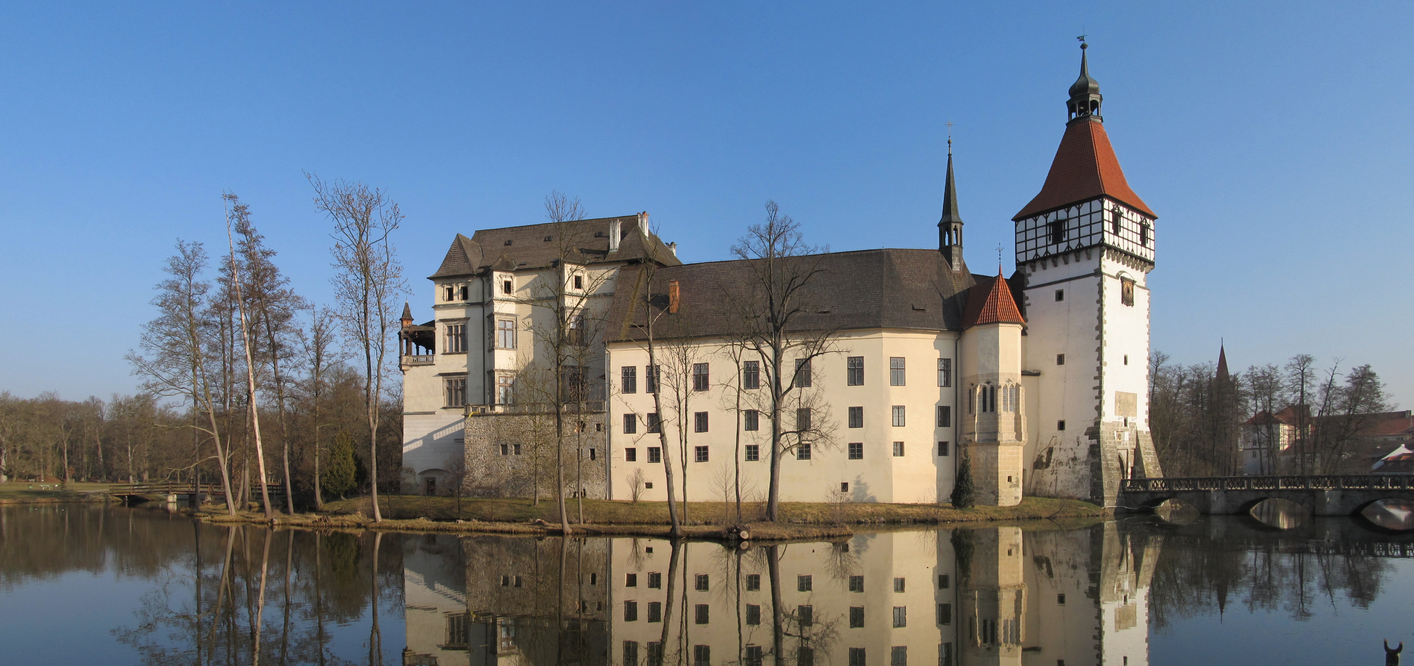 Blatná - zámek